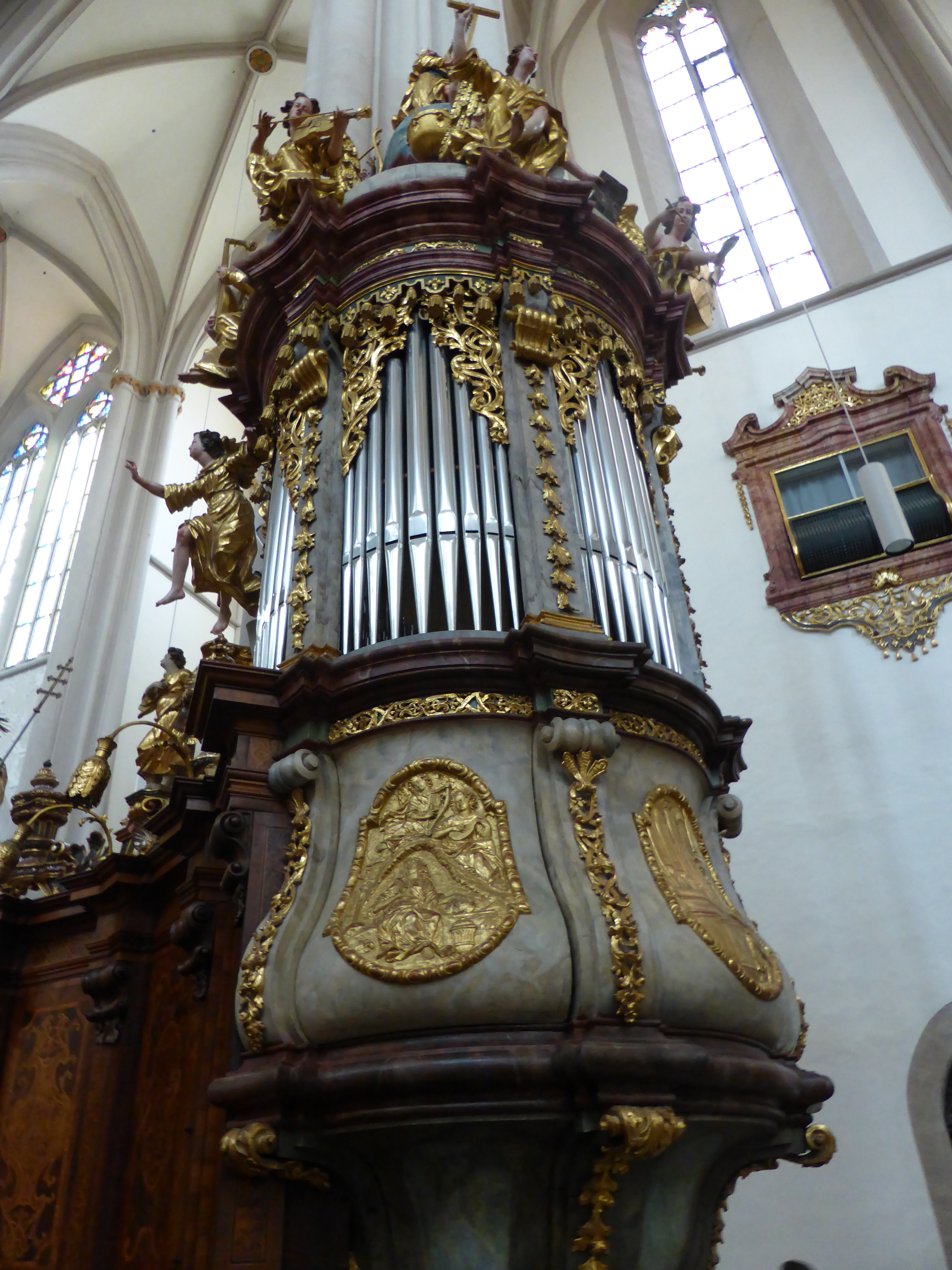 Orgelgehäuse 1727, Orgel von Gerhard Hradetzky 1982